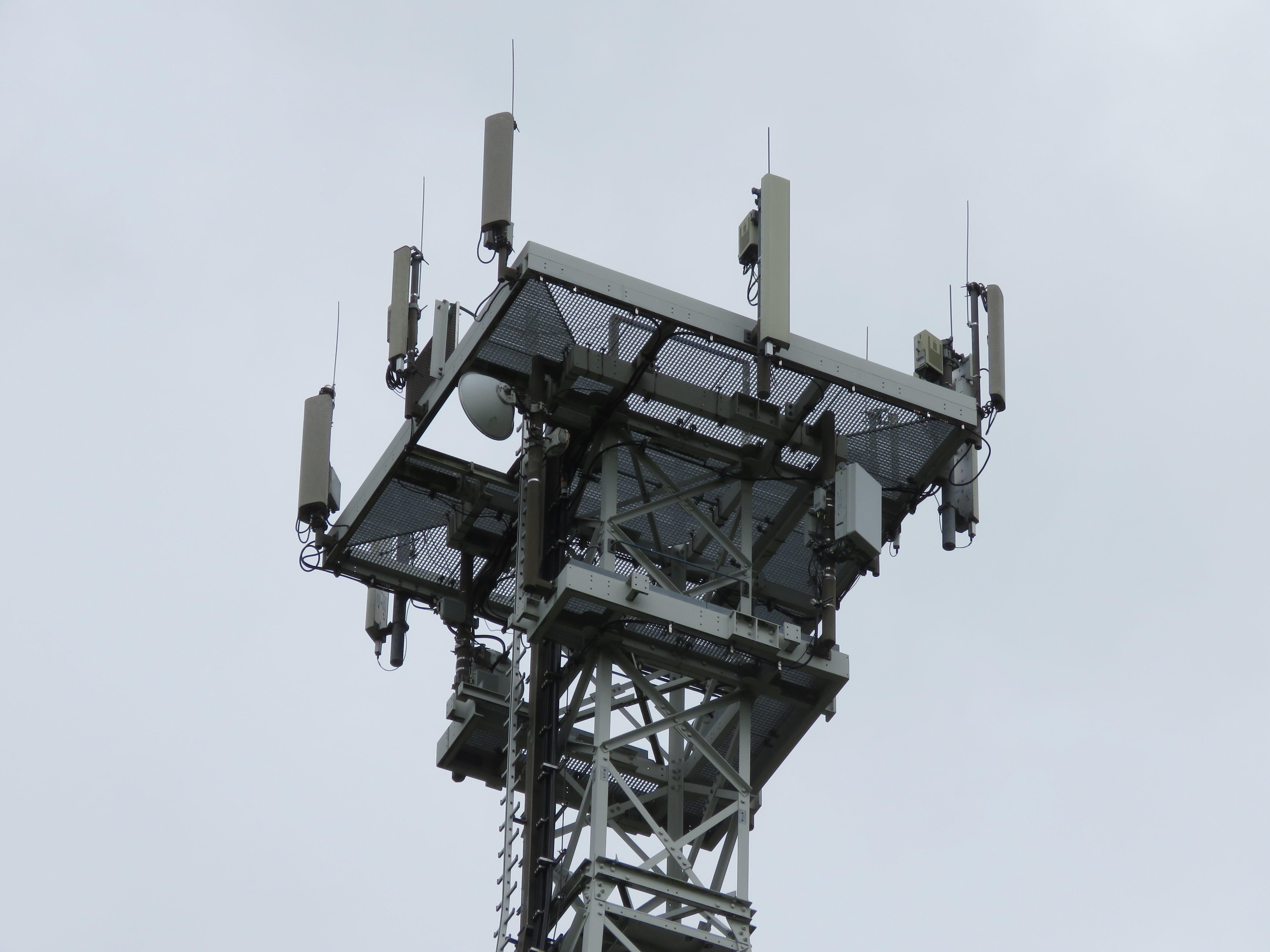 Vodafone-5G-Standort in Hattstedt in der Nähe von Husum (Nordsee).